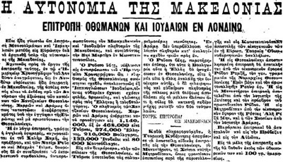 Детайл от гръцкия вестник "Емброс" (1913).